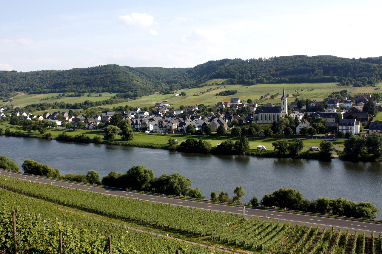 Panoramasicht auf Lösnich von der linken Moselseite